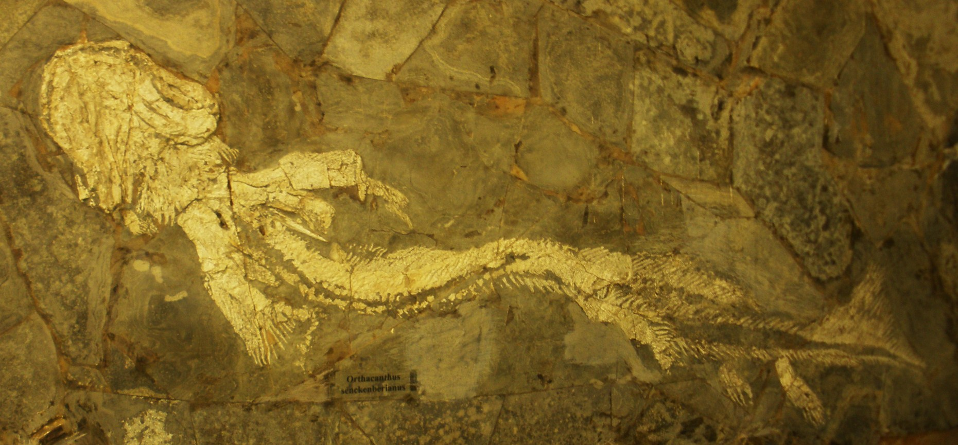 Fossil of Orthacanthus, an extinct fish